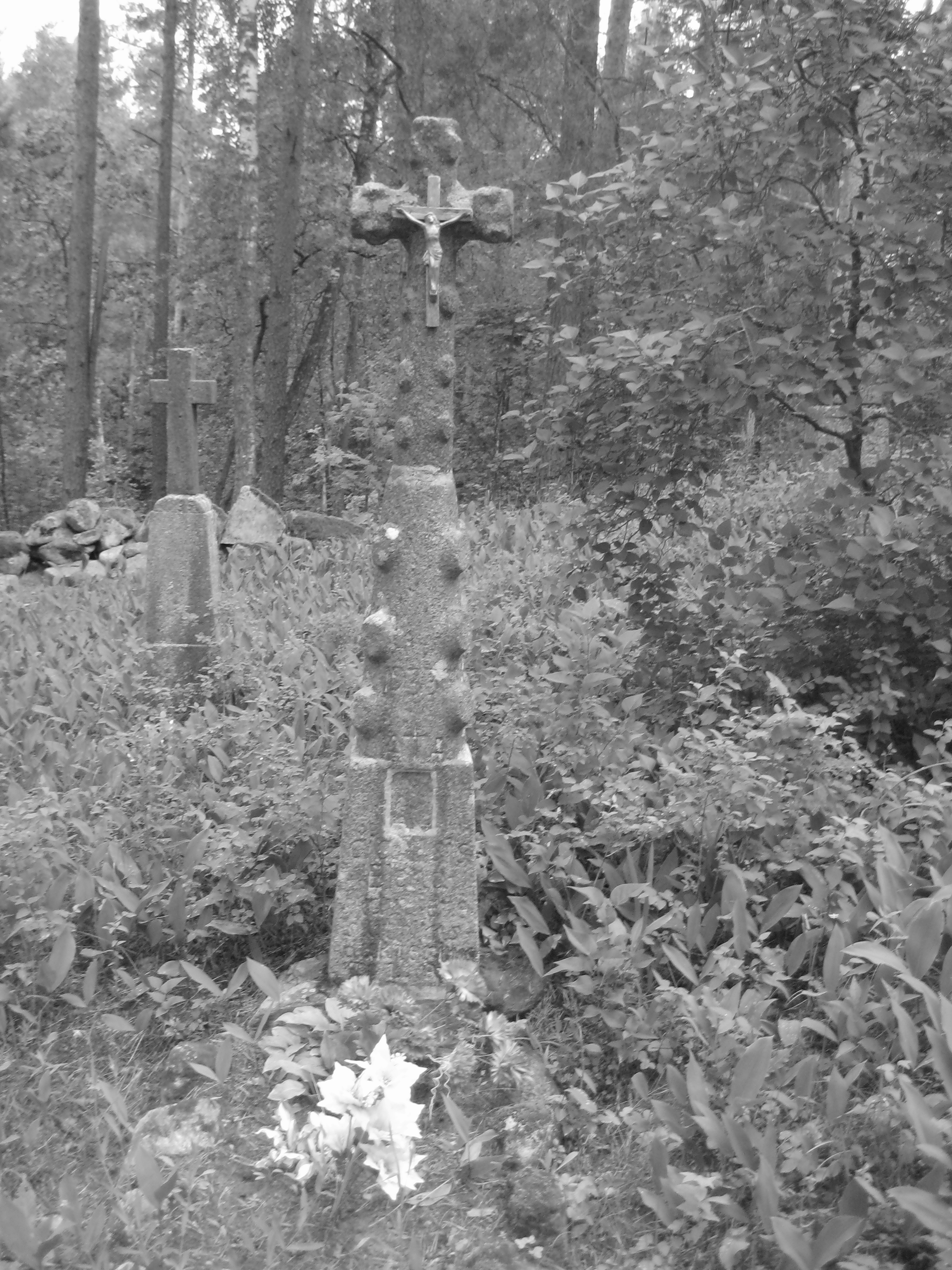 Degučių sen., Lithuania